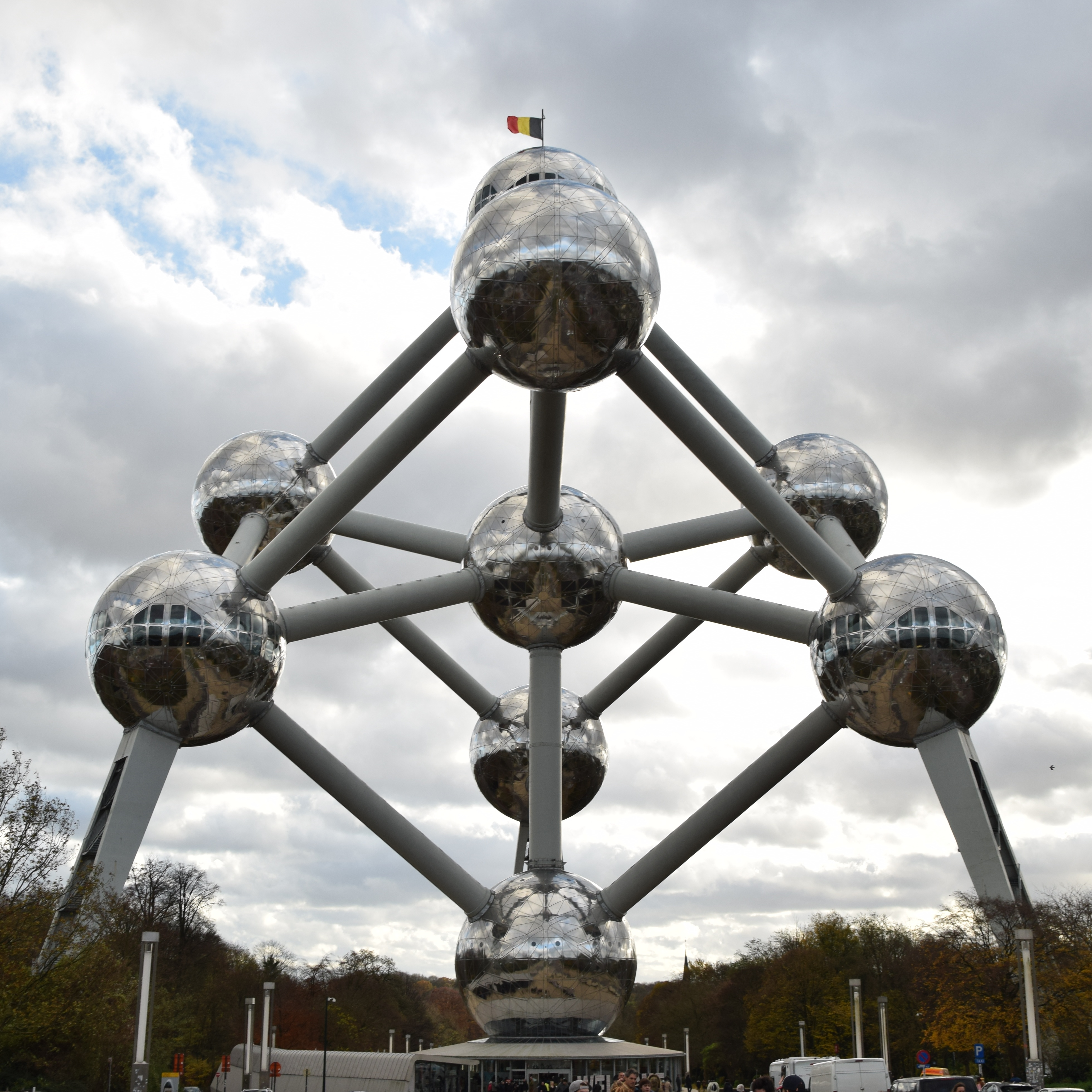 Atomium in Brussels after renovation